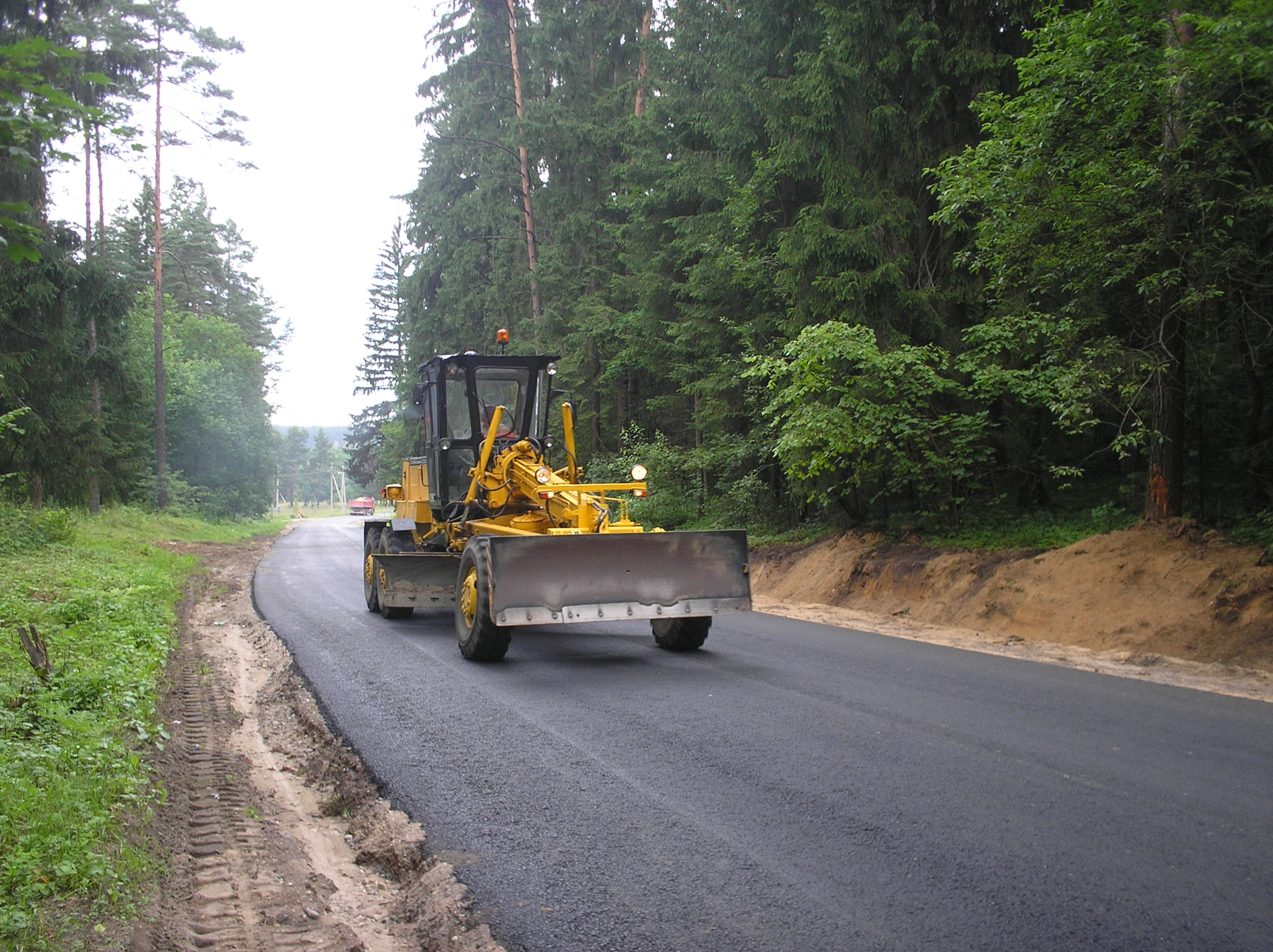 Грейдер